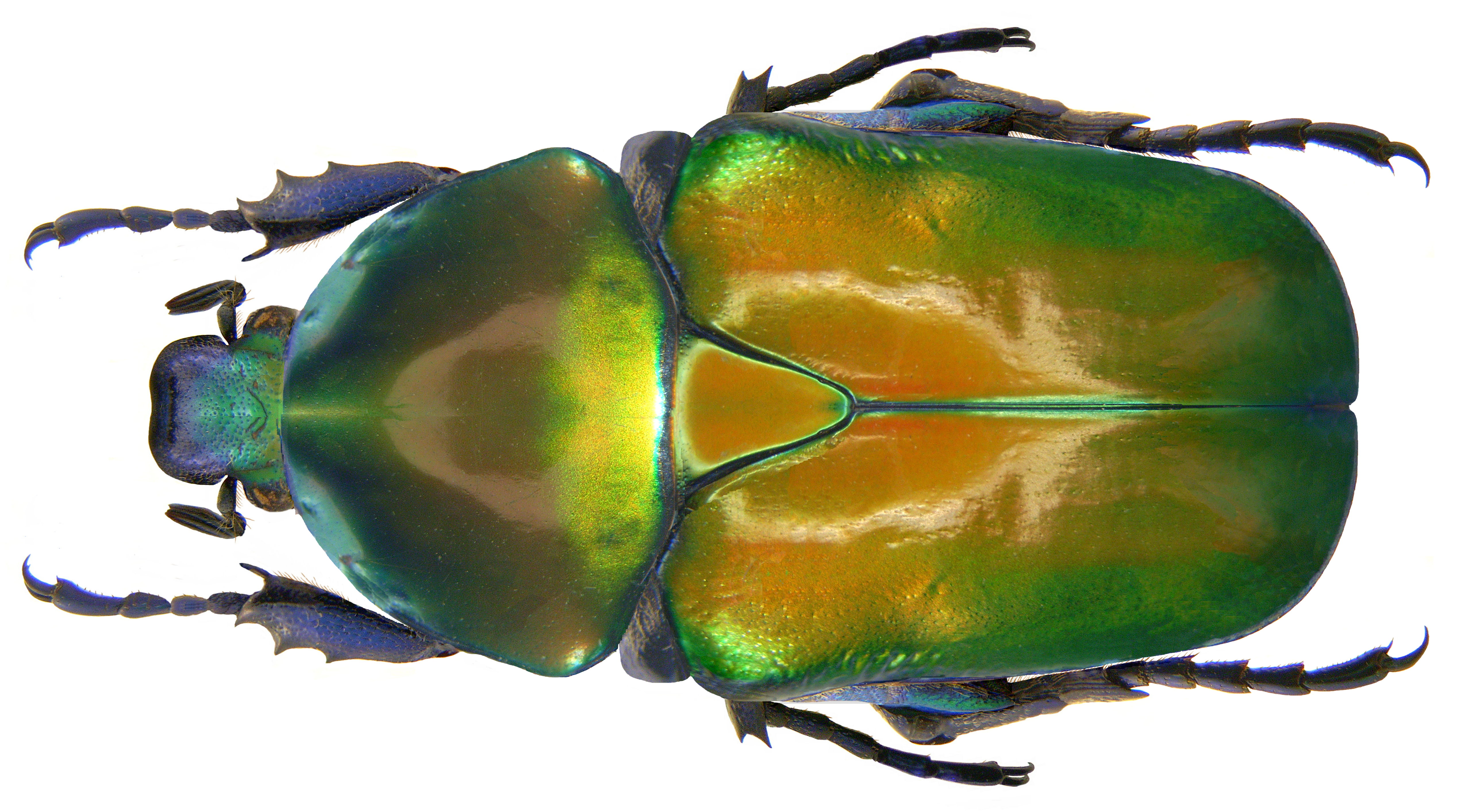 Familie: Scarabaeidae Groesse: 24,6-29,5 mm Fundort: Iran, Prov. Mazandaran, N. Elburz, Dohesar Road, 550 m leg. A.Skale, 2008; det. Rößner, 2008 Photo: U.Schmidt, 2009